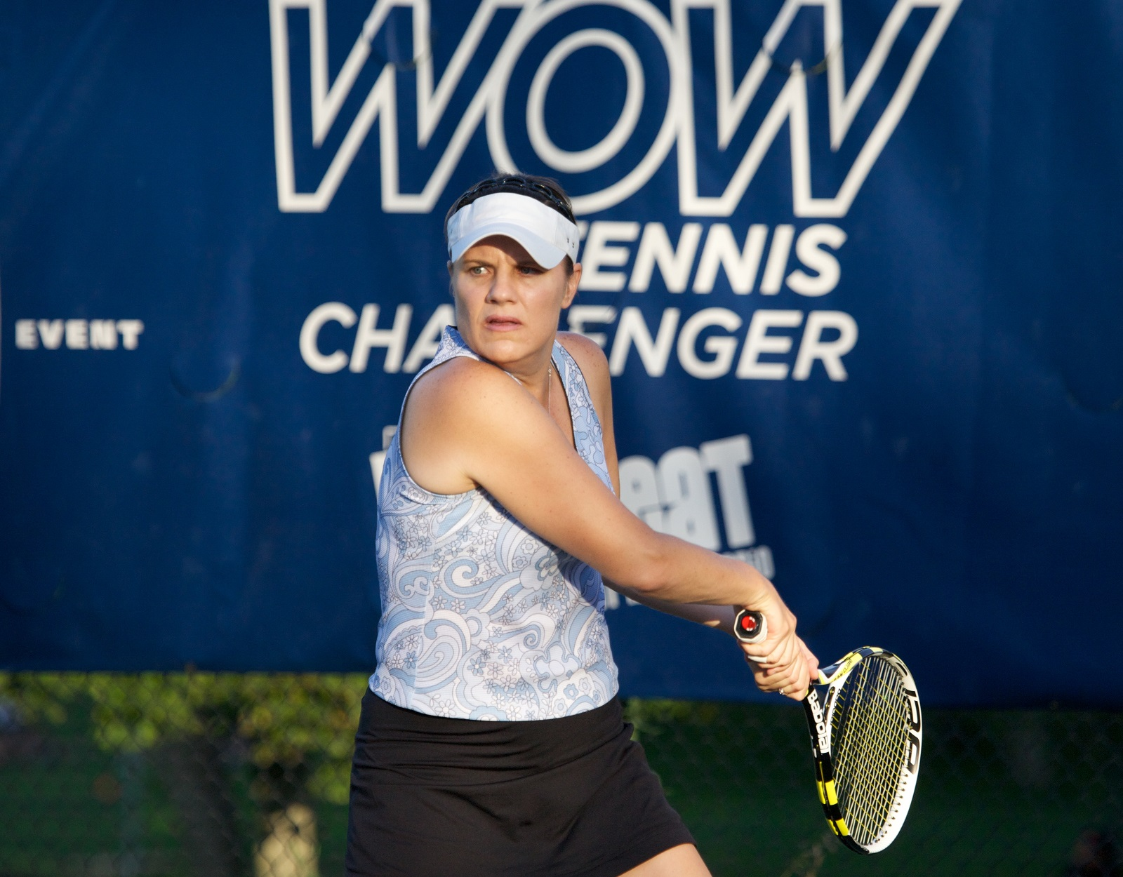 Maureen Drake in 2010